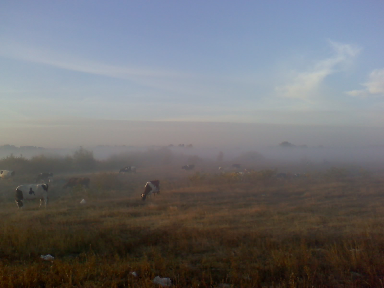 корівки